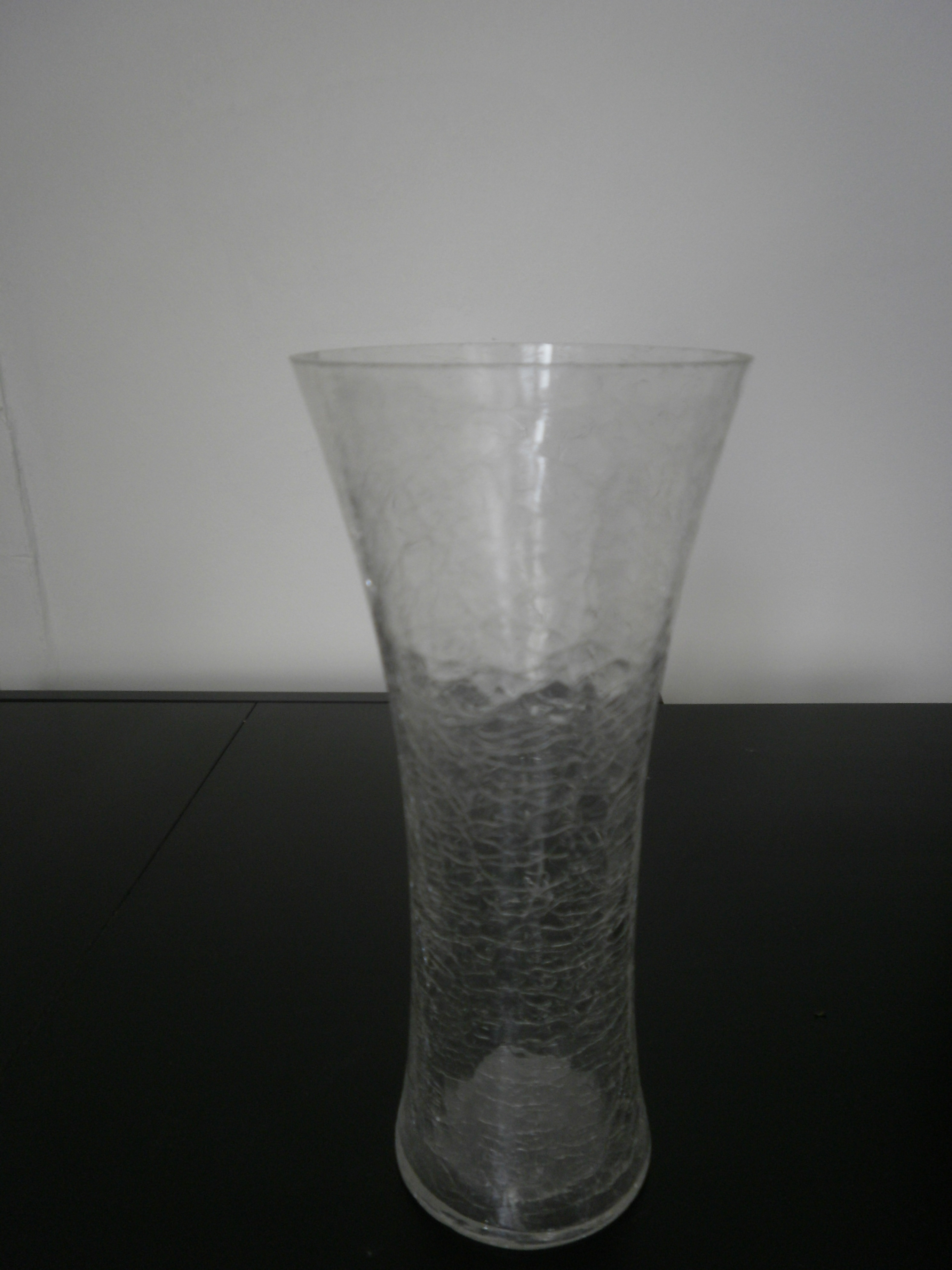 Photo de vase dont le matériau est du "verre craquelé"